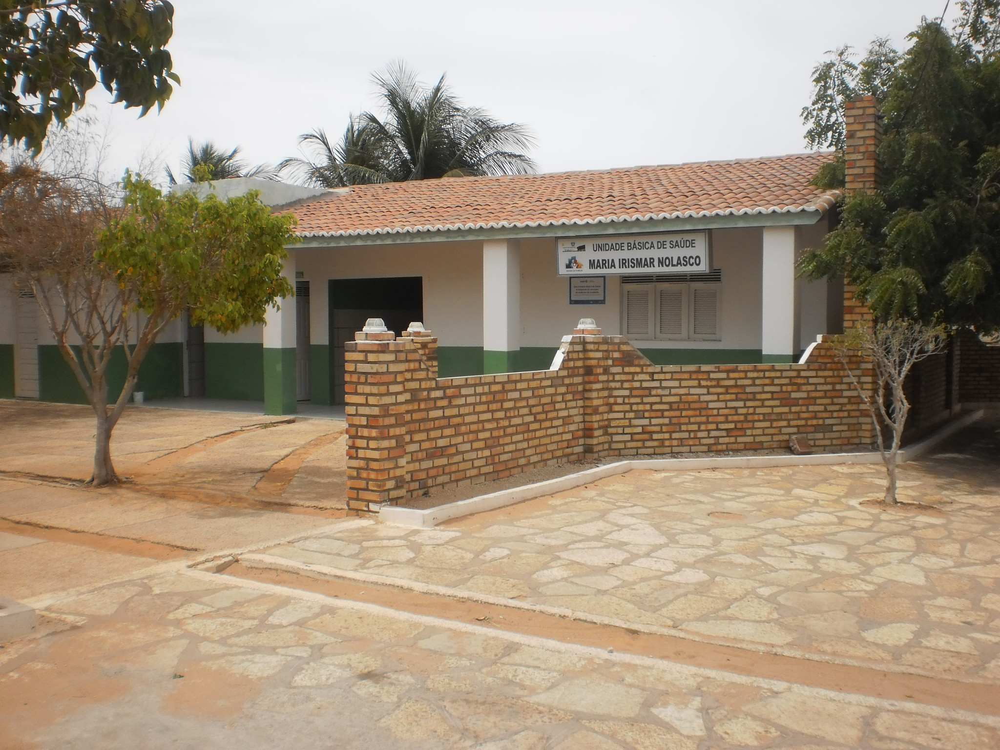 Unidade de Saúde Mista Santa Terezinha, Tibau, Rio Grande do Norte, Brasil.